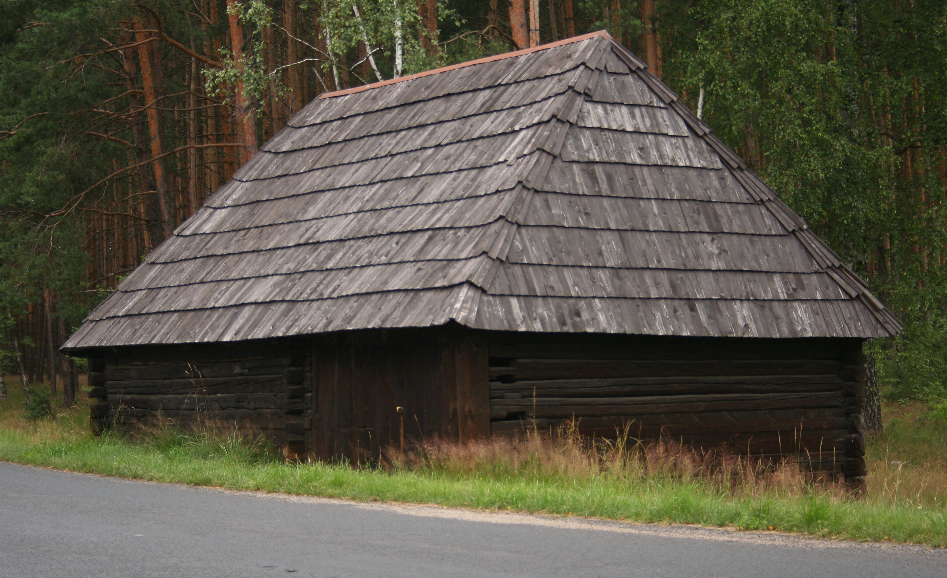 Budynek w Bruśku, powiat lubliniecki